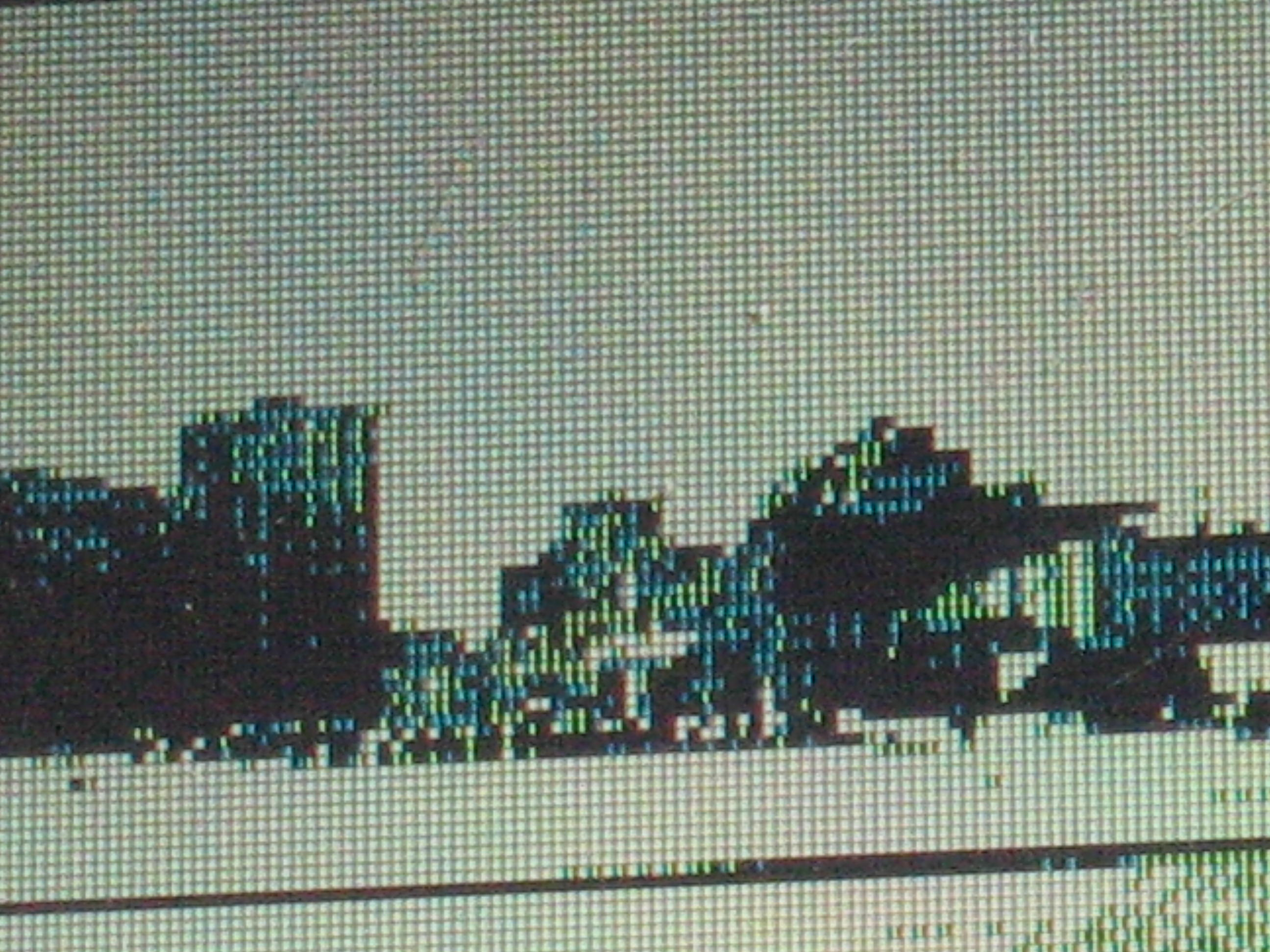 Imatge pressa amb una Game Boy Camera des del MCdonalds de l'estació de sants, a sants (Barcelona).